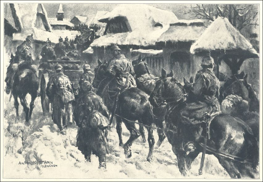 Geschütze in den Karpaten